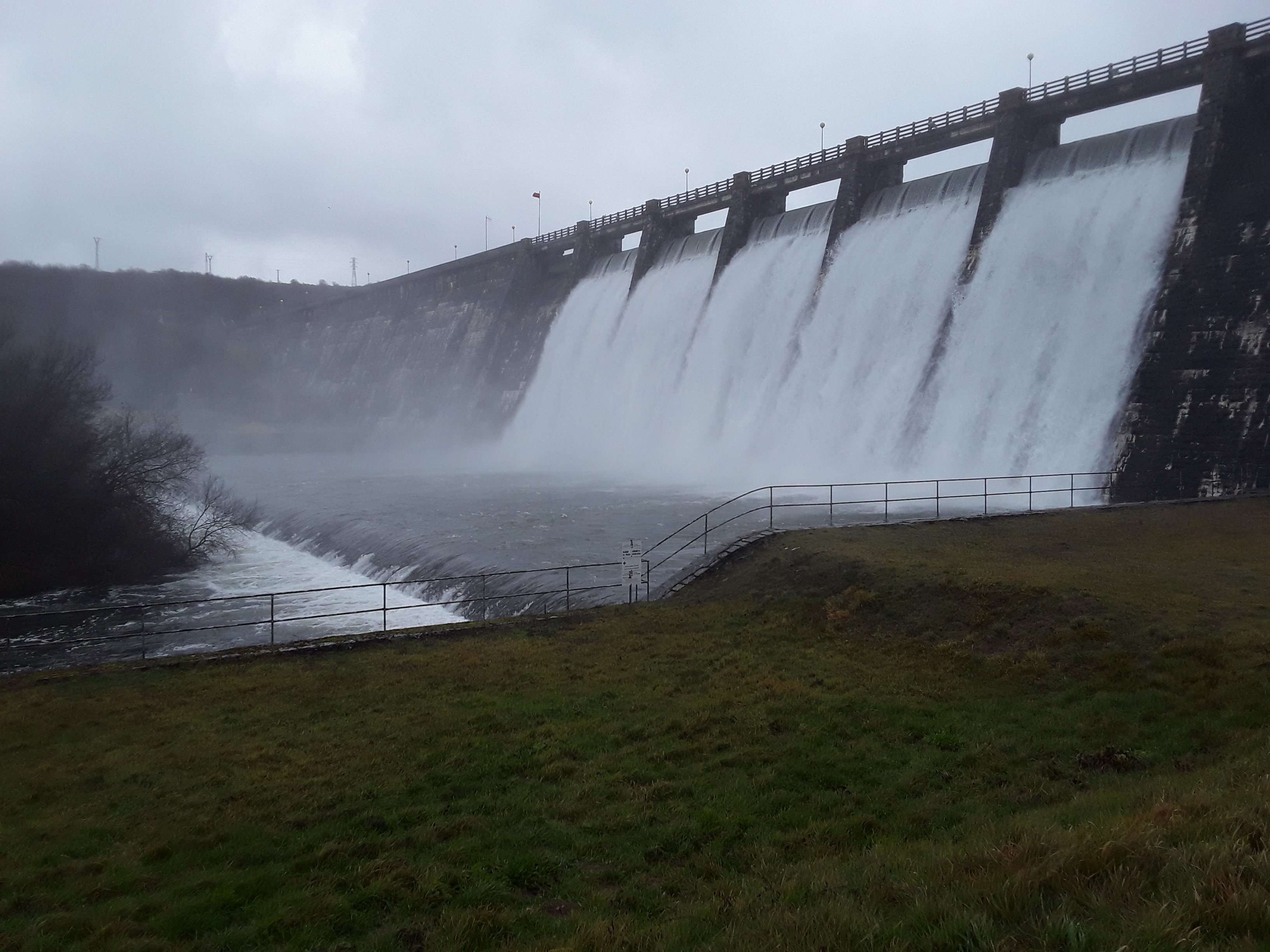 Uribarri Ganboako Urtegia, ura askatzen